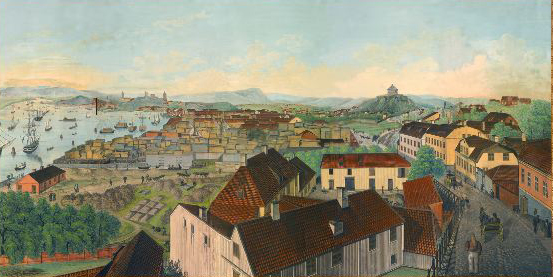 Stigbergsliden 1840. Painting